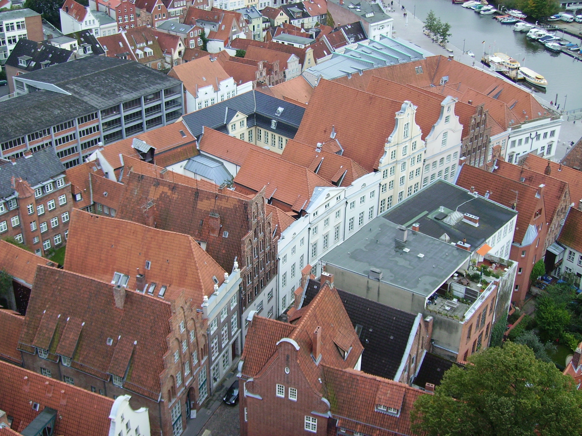 Blick auf die Straße Große Petersgrube in Lübeck von St. Petri